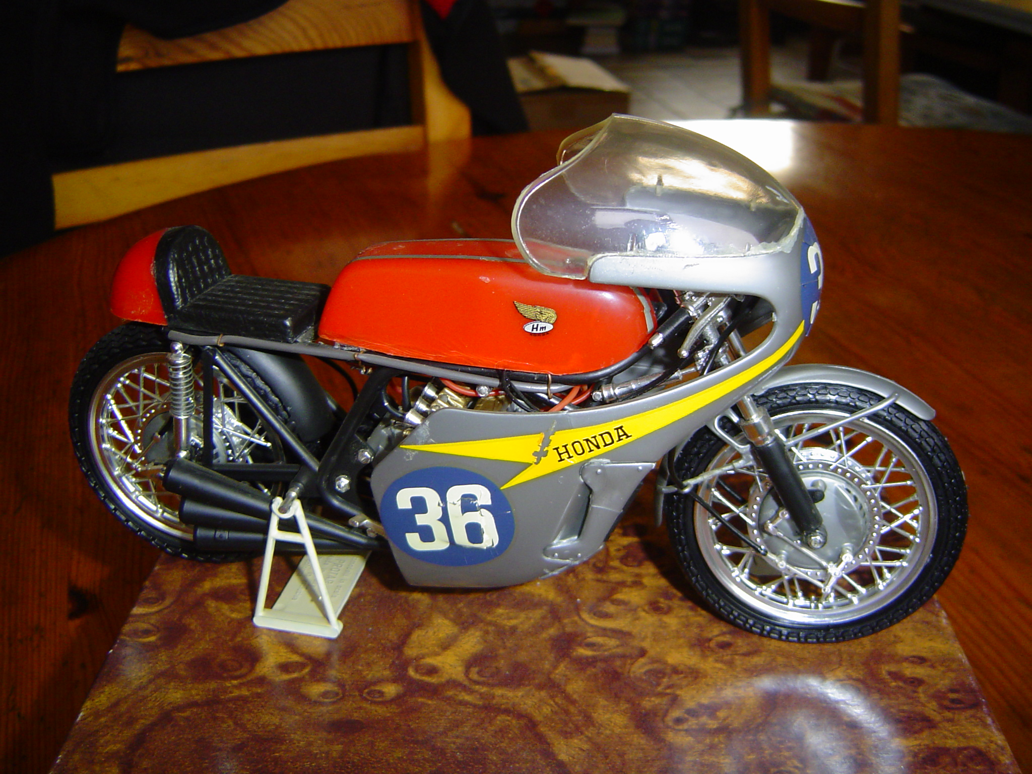 ...en van de 350 cc-versie, de RC 174.